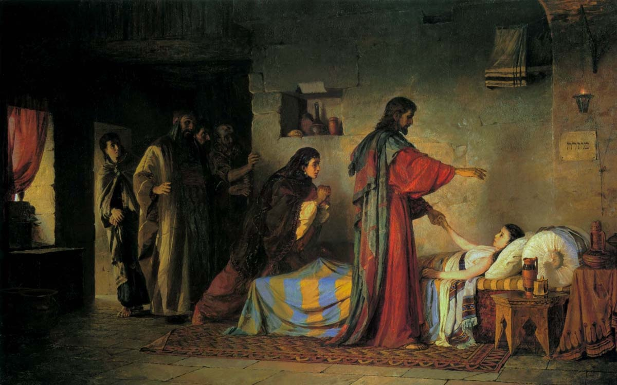 Картина "Воскрешение дочери Иаира" - художник Василий Дмитриевич Поленов (1844—1927), академик Императорской Академии художеств.